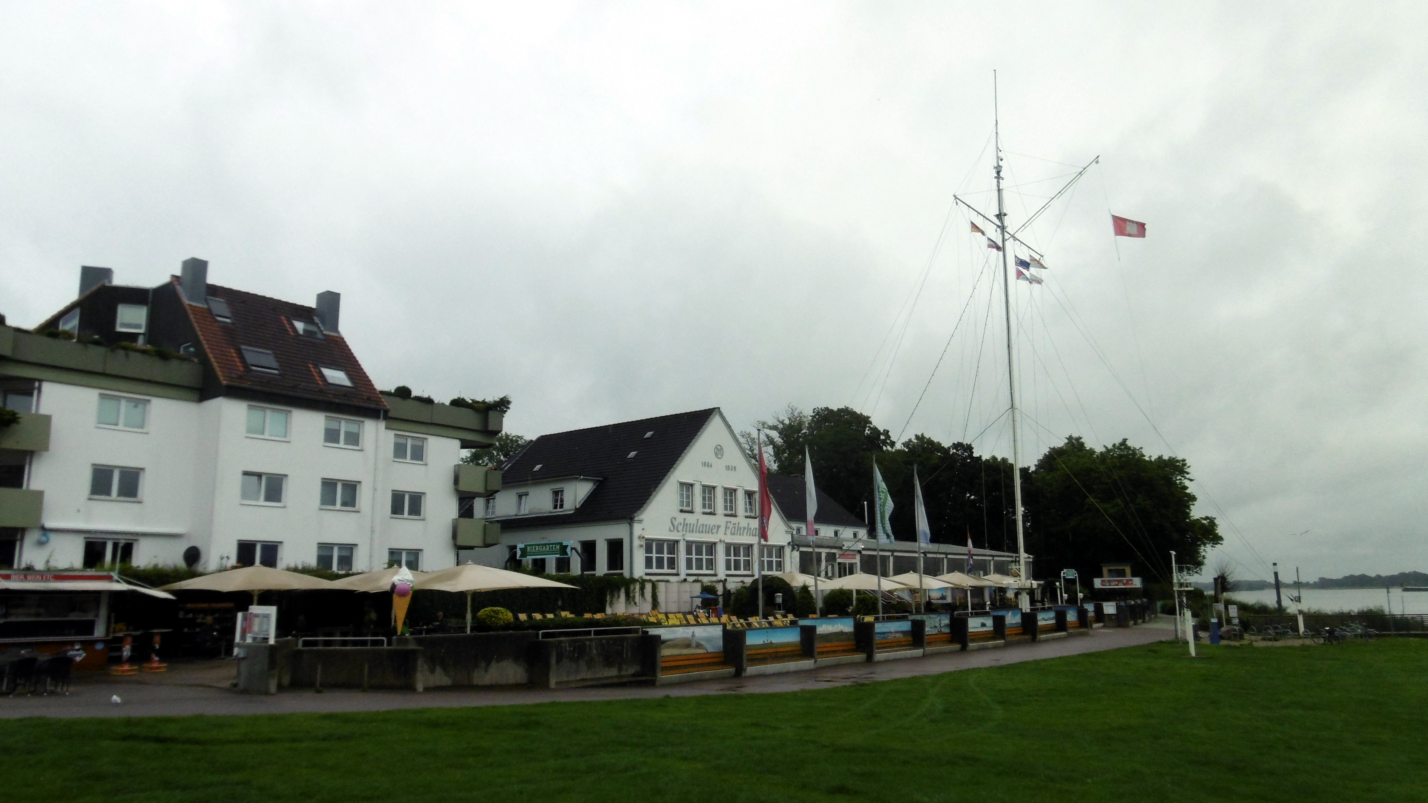 Beim Willkommen Höft Wedel werden die Schiffe begrüßt die in den Hamburger Hafen rein oder raus fahren! Käpt'n Wolfgang Adel macht ist im Schulauer Fährhaus der Begrüßungskapitän. Im Archiv befinden sich 17.000 Karteikarten mit Informationen und Daten von den Schiffen die hier in Wedel täglich begrüßt werden.